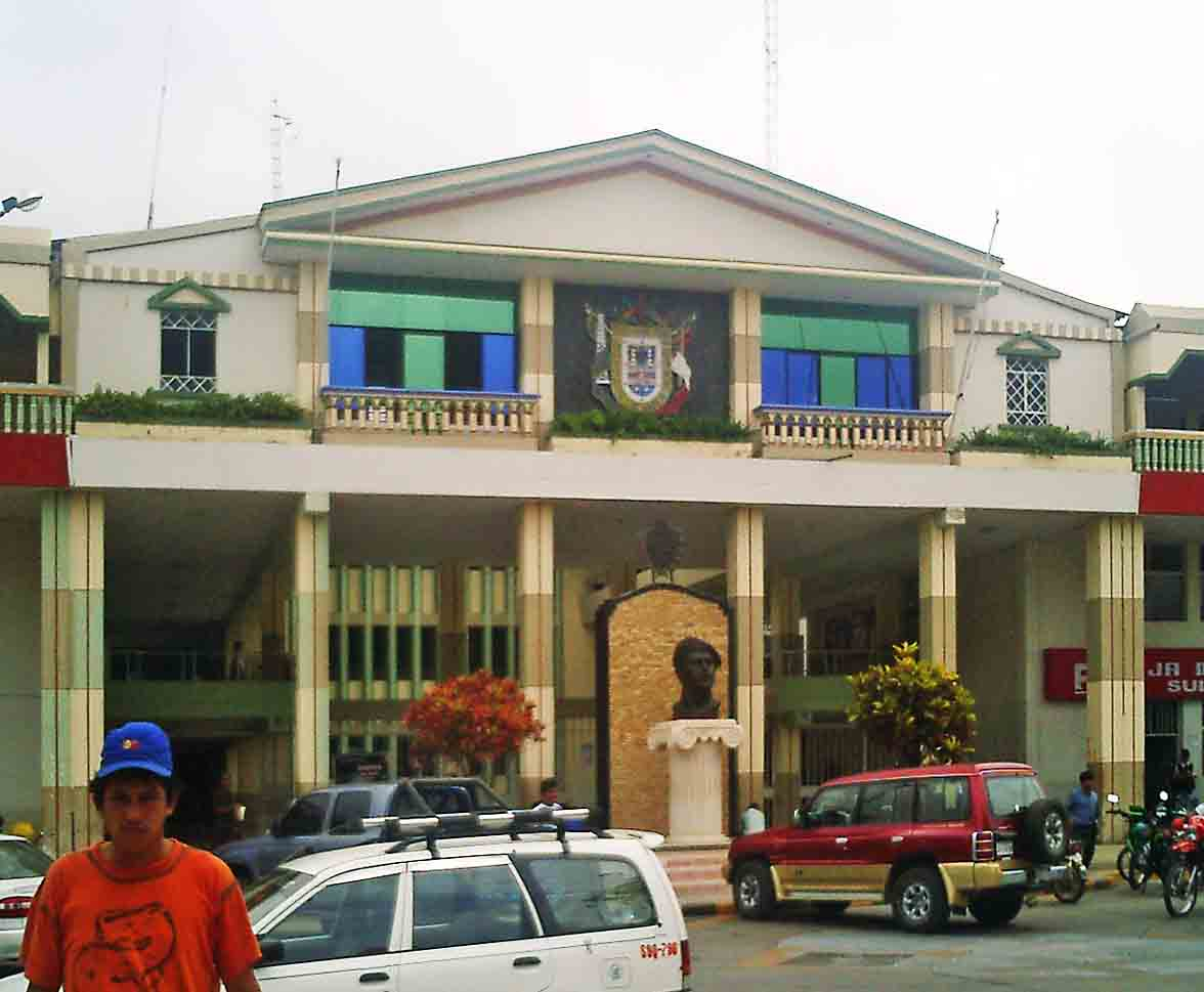 Municipalidad Provincial de Tumbes. Foto tomada por Chalisimo5 18:59, 30 January 2006 (UTC).